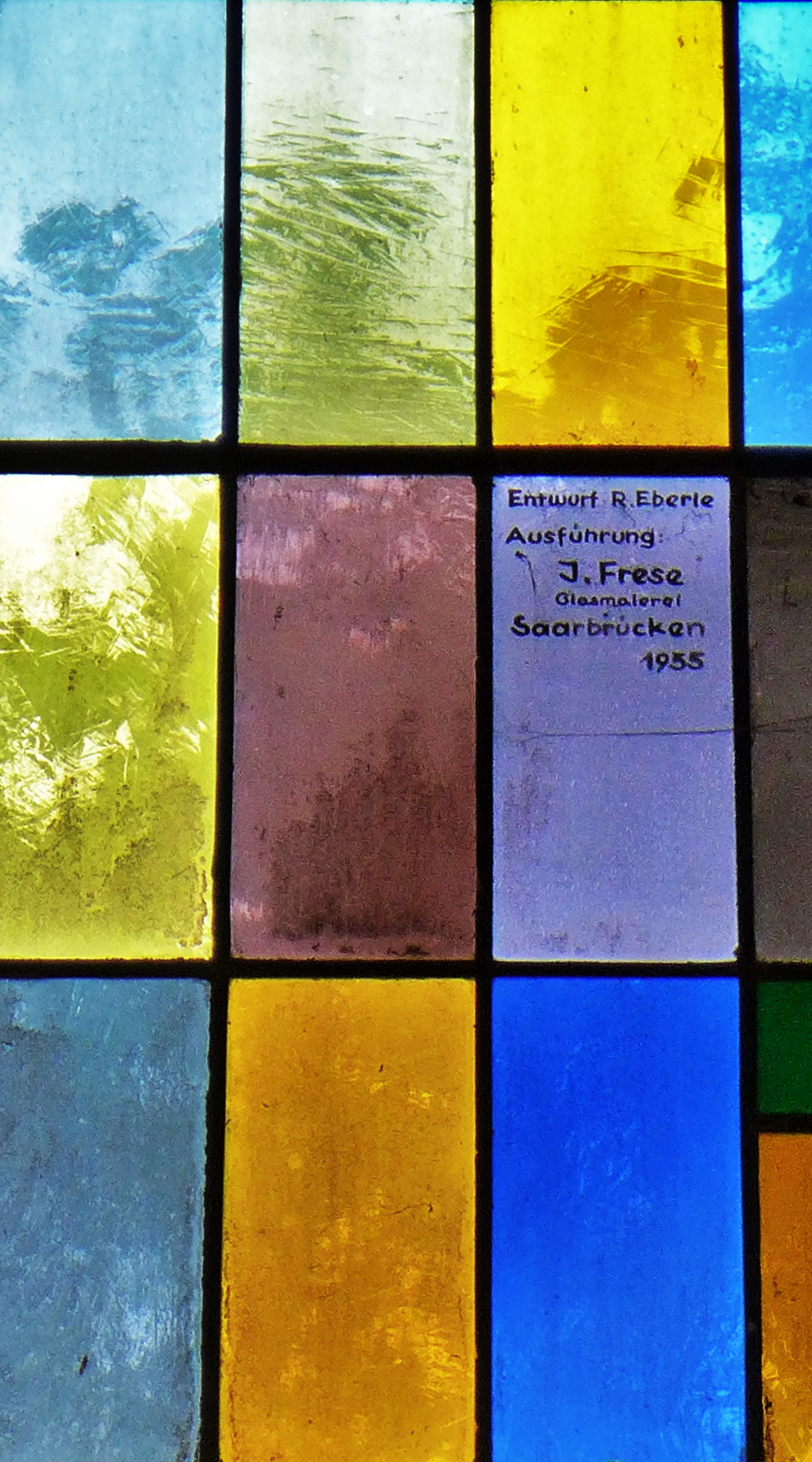 St. Josef und St. Wendelin (Diefflen), Signatur der Fenster aus dem Jahr 1955; Entwurf: R(ichard) Eberle; Atelier: J(osef) Freese (Saarbrücken)